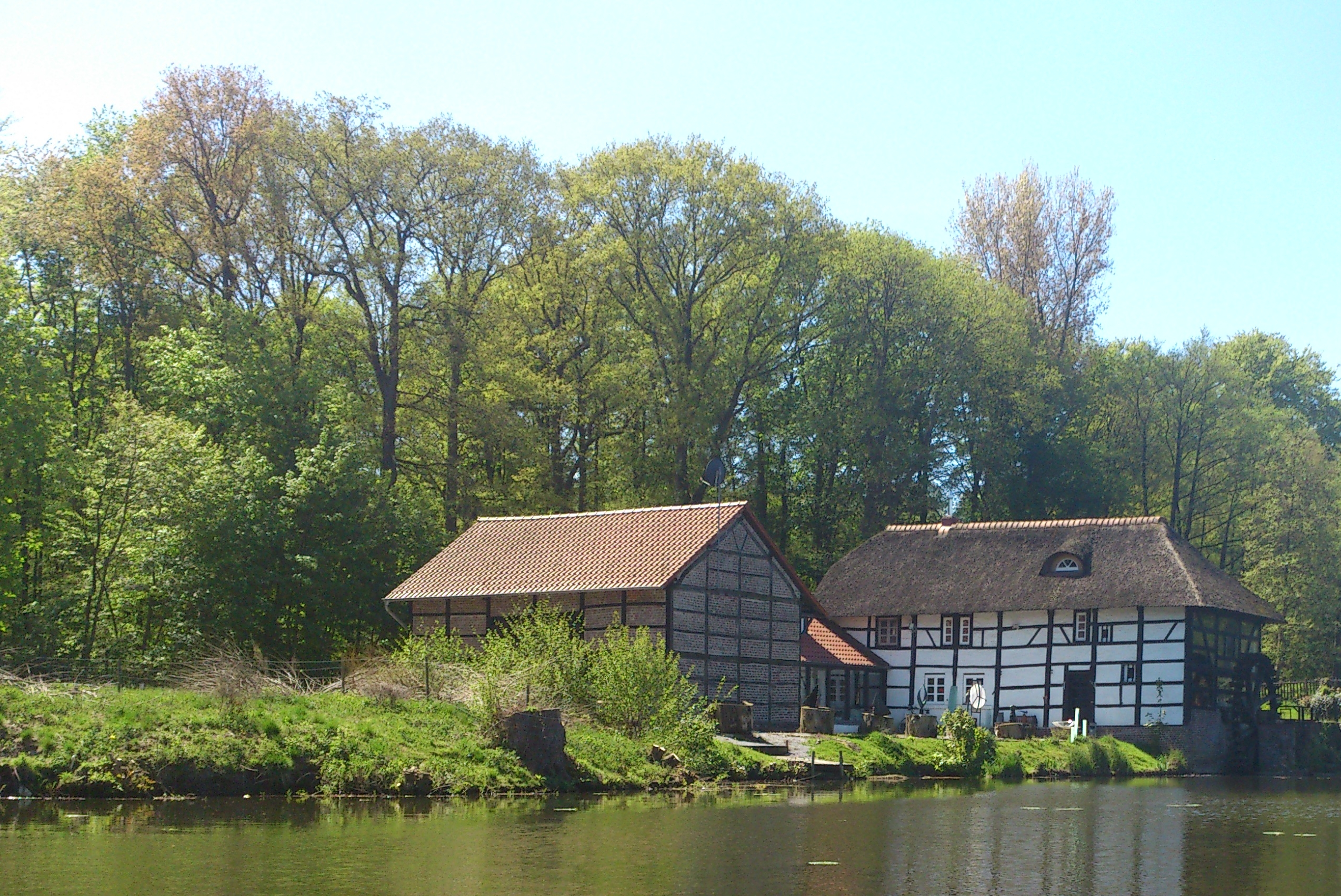 Die Wassermühle des Schlosses Tüschenbroich